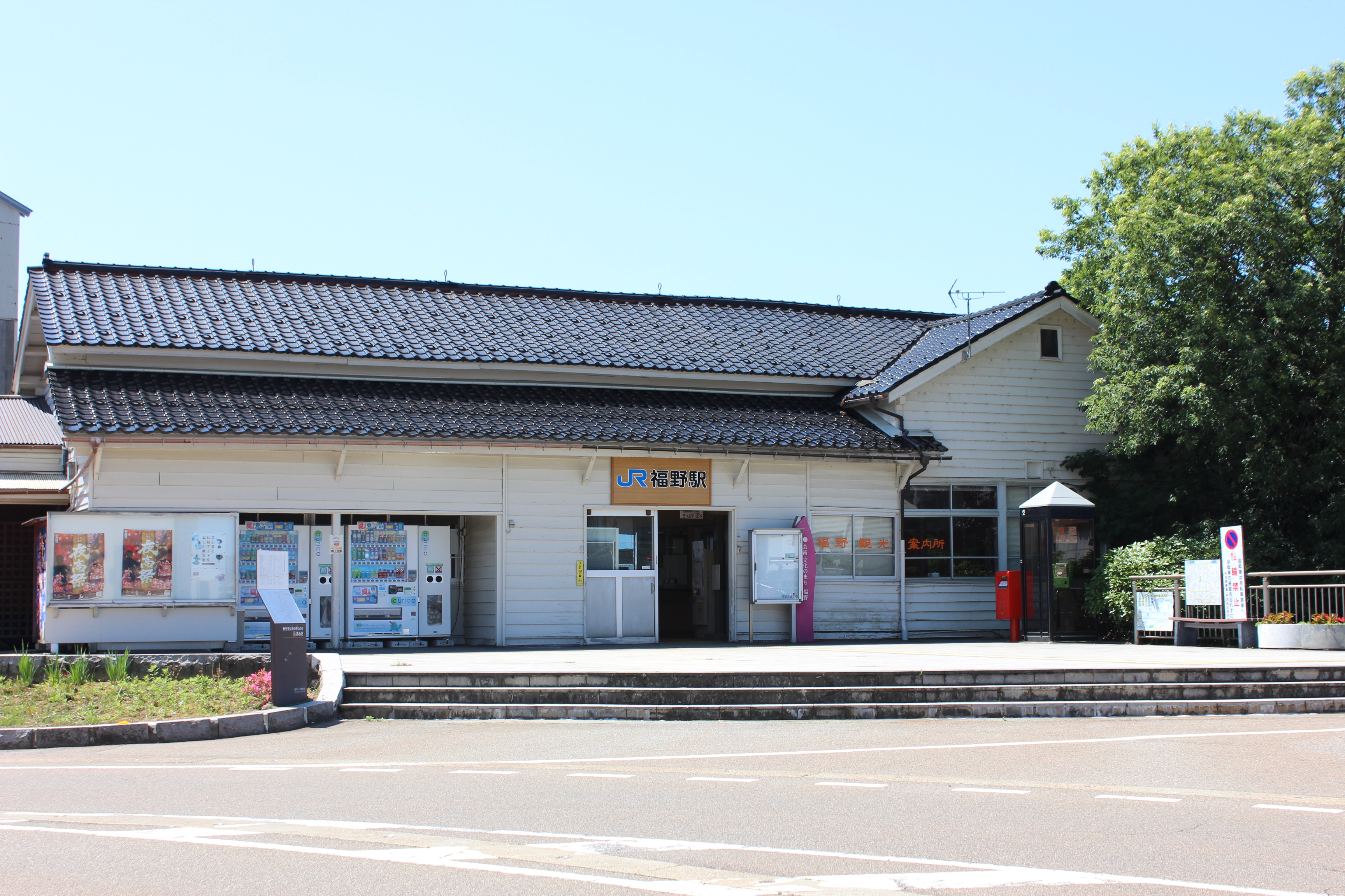 JR城端線福野駅（富山県南砺市） Canon EOS Kiss X5